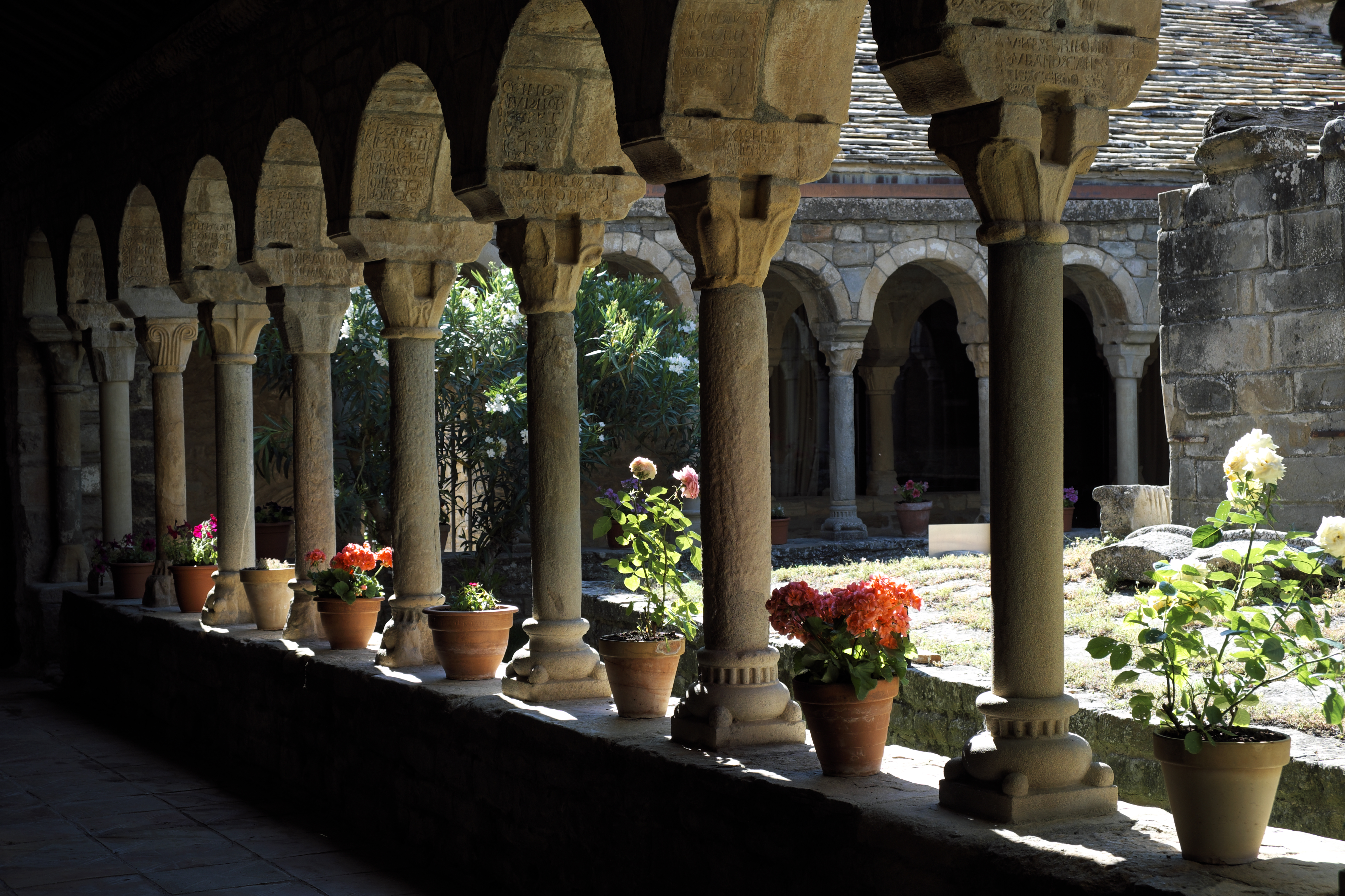 Kreuzgang der Kathedrale San Vicente in Roda de Isábena in der Provinz Huesca (Aragón/Spanien)